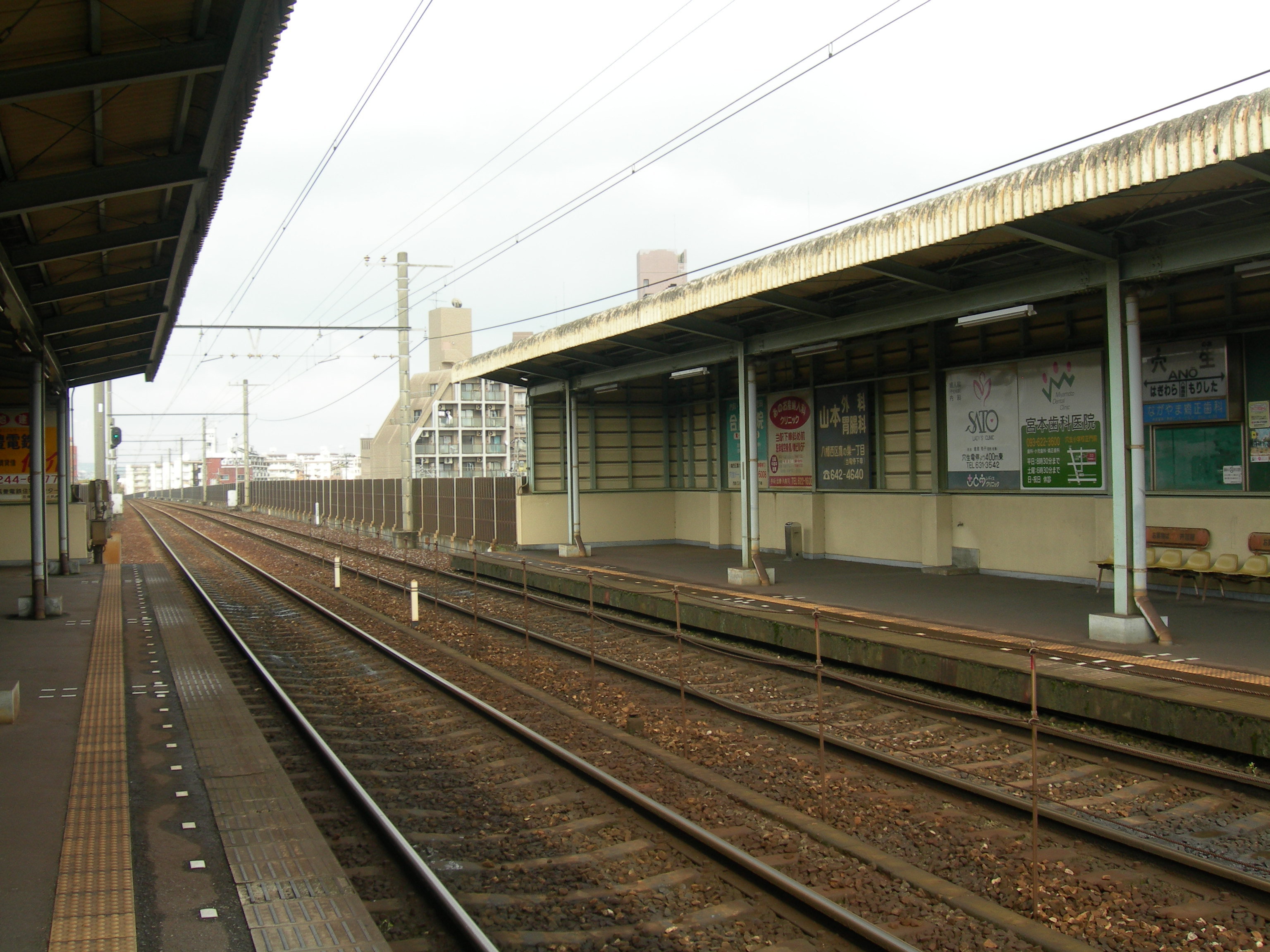 穴生駅プラットホーム